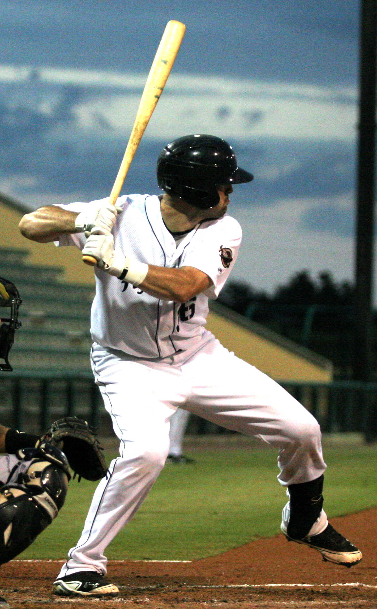 Curt Casali